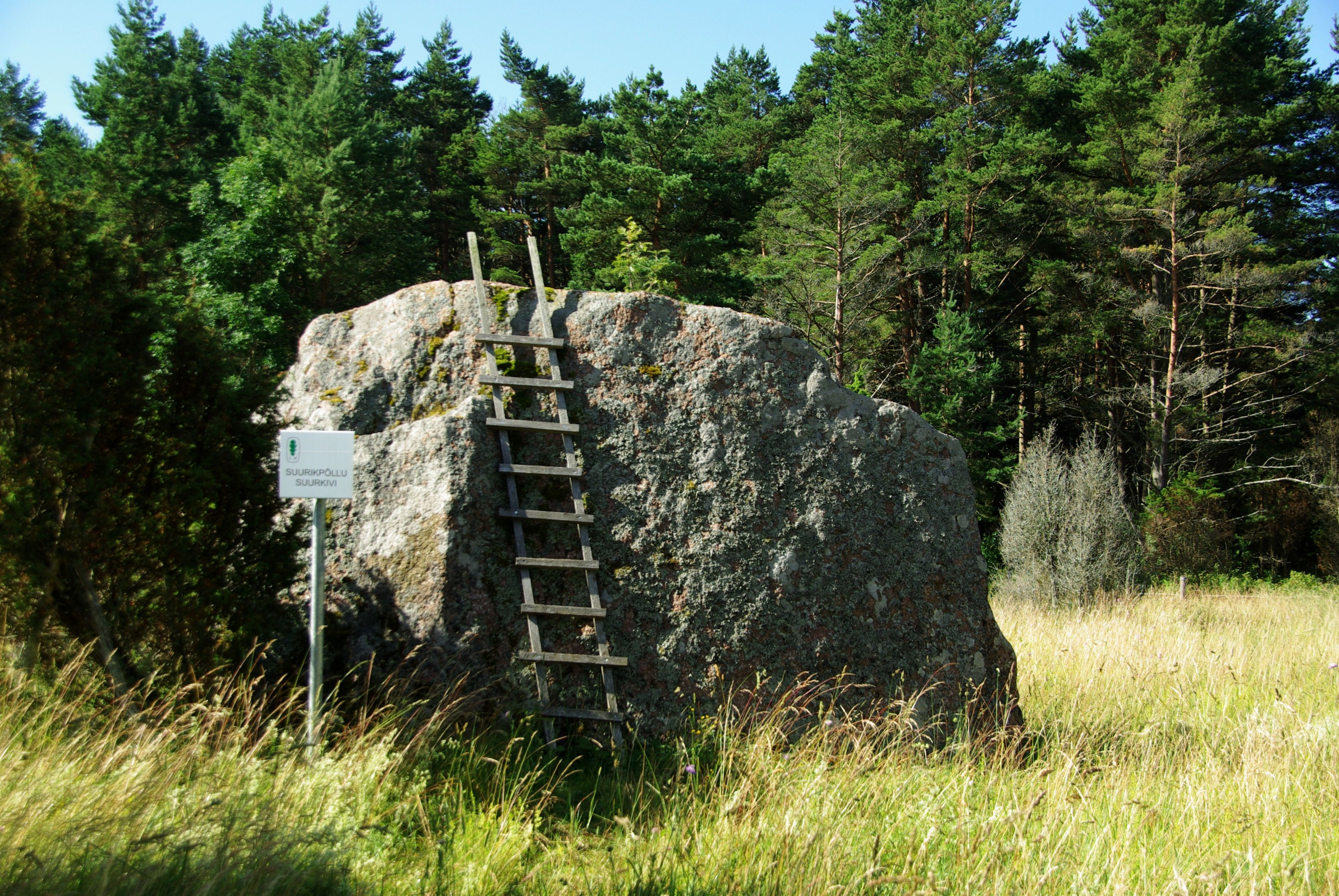 Suurikpõllu suurkivi